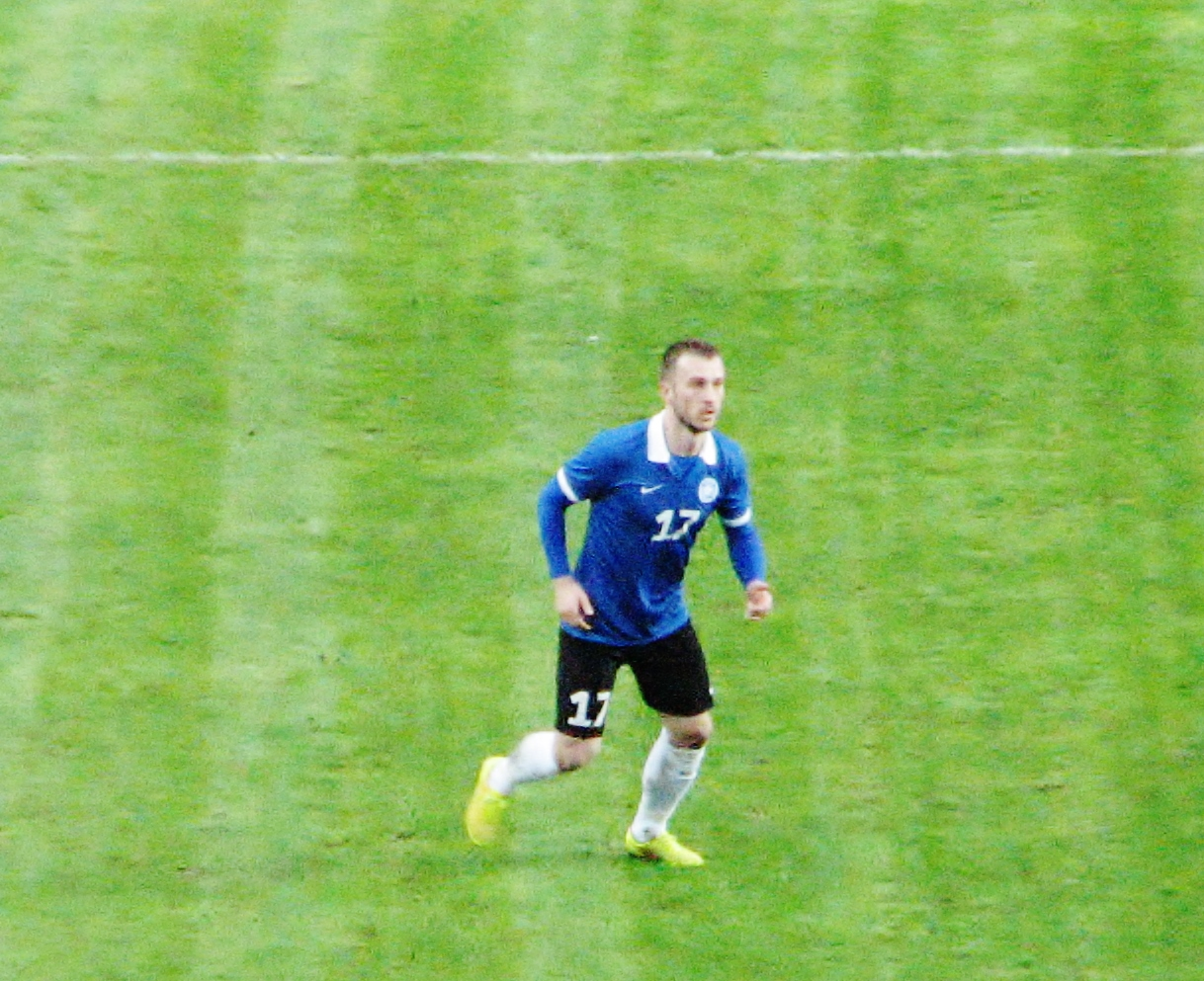 Enar Jääger mängimas Islandi koondise vastu Raio Piiroja lahkumismängus